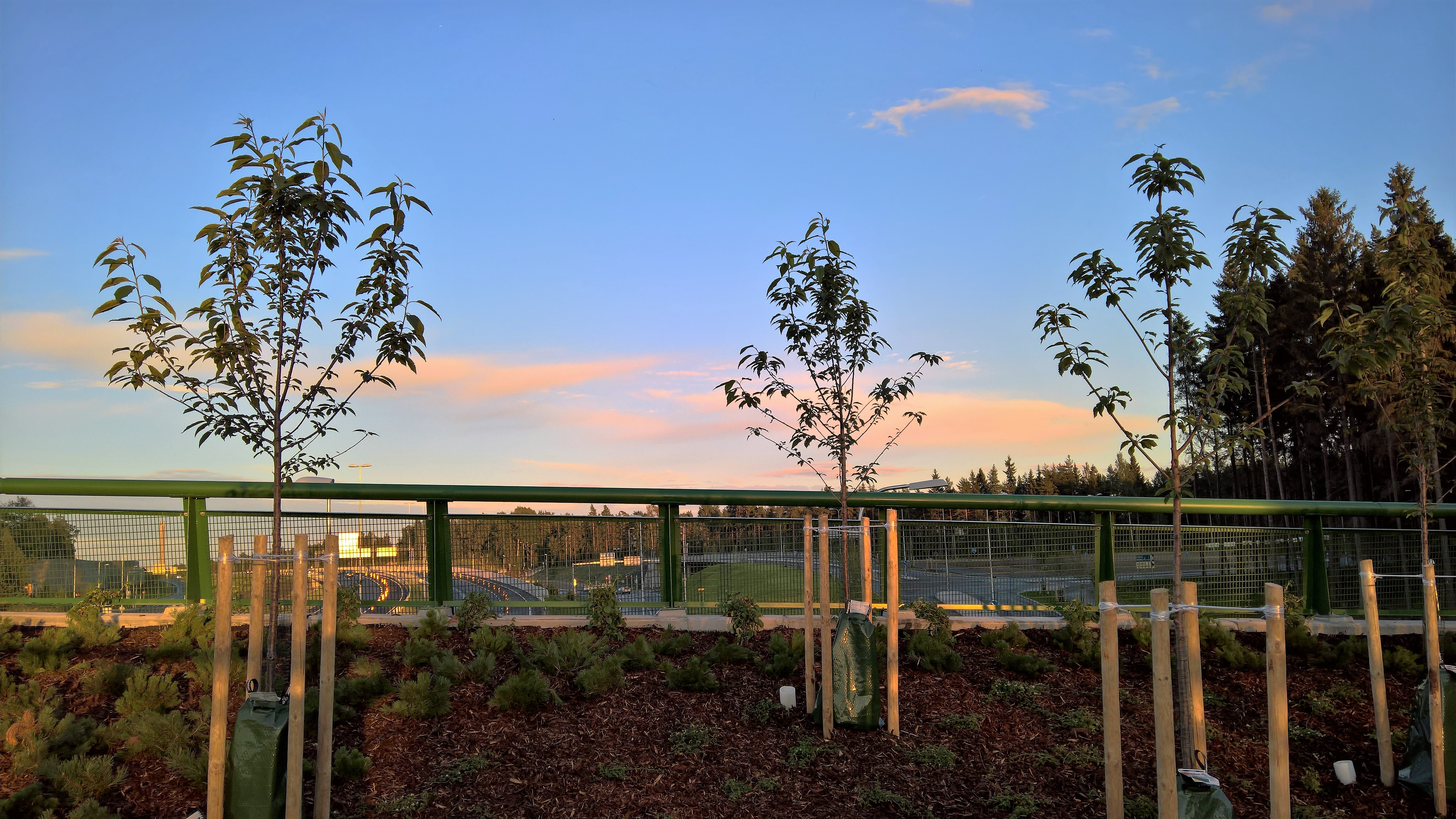 Näkymä Viikin puistosillalta itään 2016